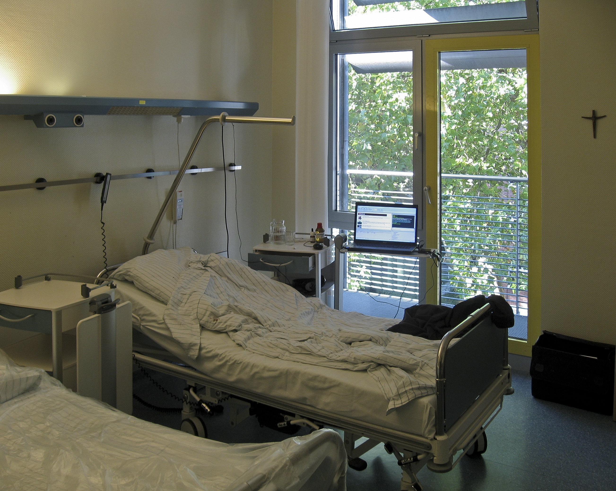 2-Bett-Zimmer in deutschem Krankenhaus 2011